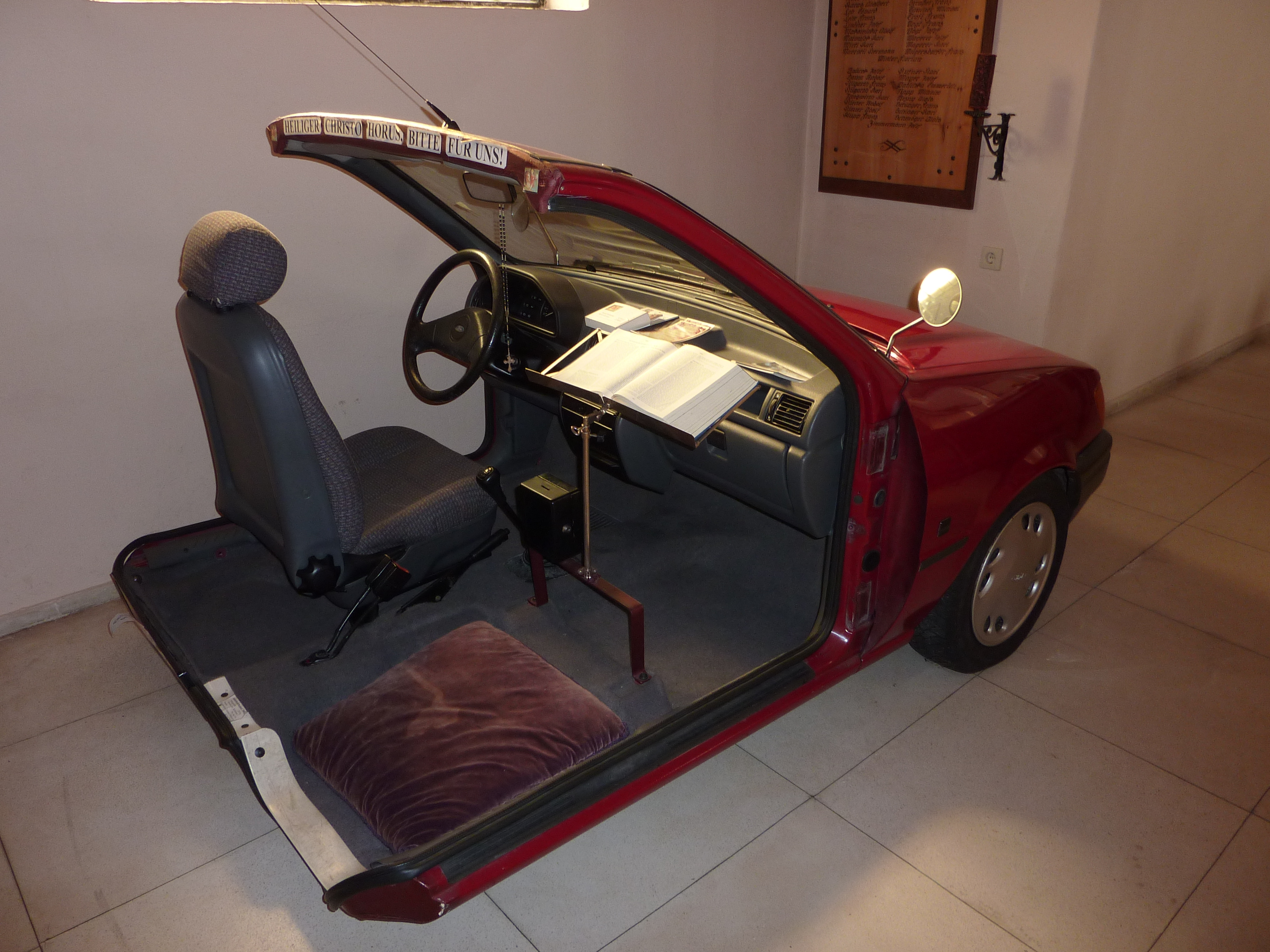 Pfarrkirche hl. Christophorus, Sigmundsherberg, Niederösterreich - Auto-Vorderteil unter der Orgelempore